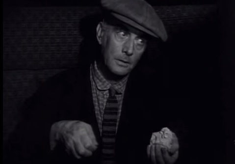 盲目のフリをした男が目の前のケーキを狙っている